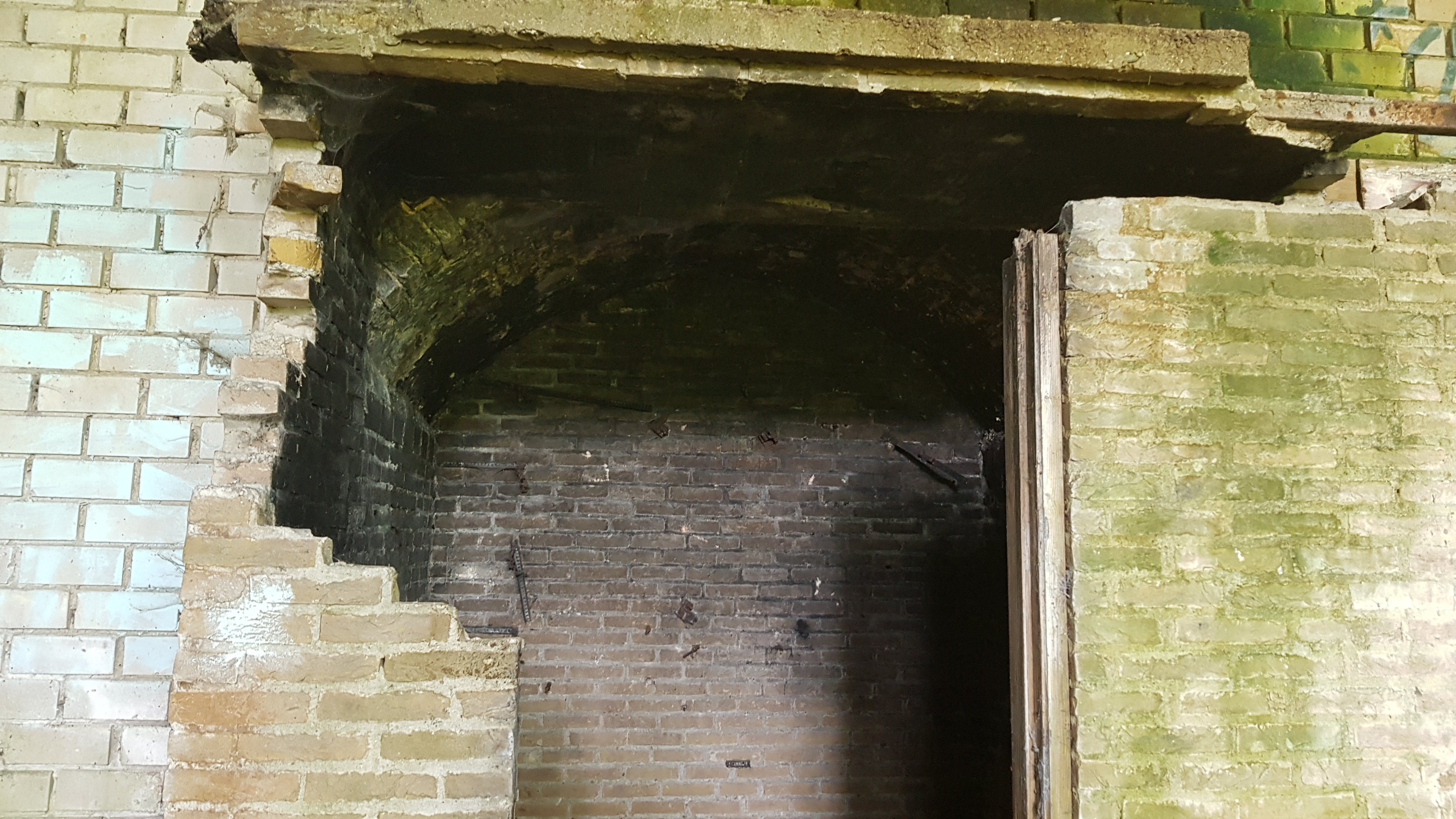 ovens IV van Kalkovens Kurvers, Ubachsberg, Nederland